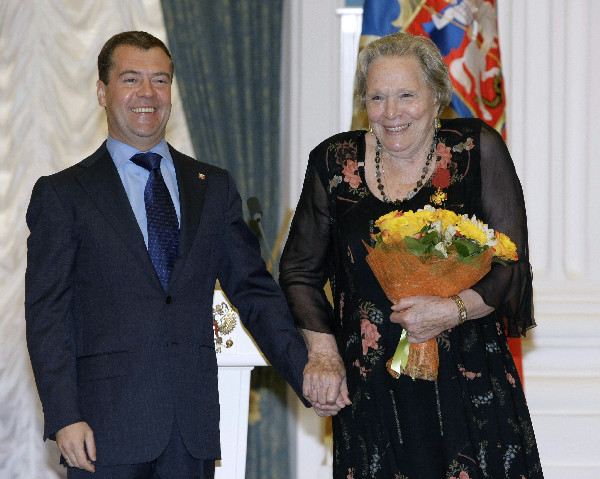 26 июля 2010 года. Президент РФ Дмитрий Медведев во время вручения ордена "За заслуги перед Отечеством" IV степени артистке кино, члену общественной организации "Союз кинематографистов РФ" Римме Марковой на церемонии награждения в Екатерининском зале Кремля.